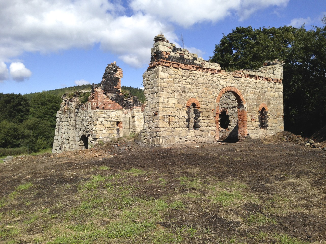 Stará huť v Šindelové, pohled od jihu na torzo provozní budovy.